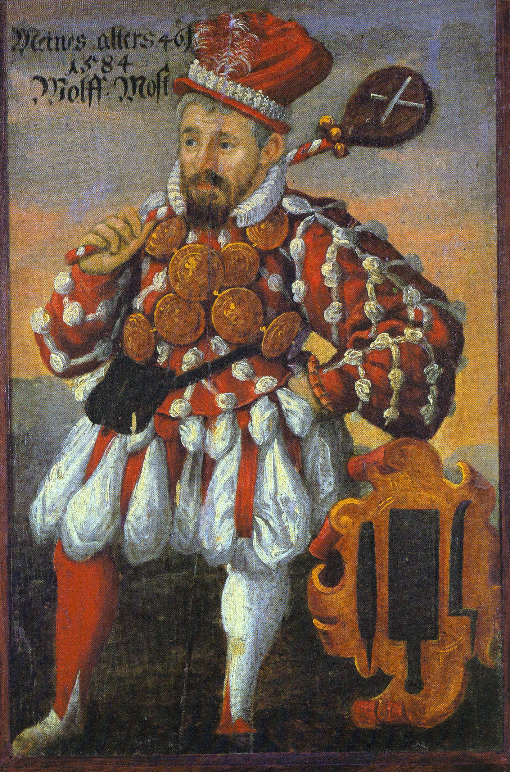 Wolf Most als Pritschenmeister der Schützengesellschaft St. Johannis zu Nürnberg, Ölgemälde im Eigentum der Hauptschützengesellschaft Nürnberg. In der Hand die namengebende Pritsche.